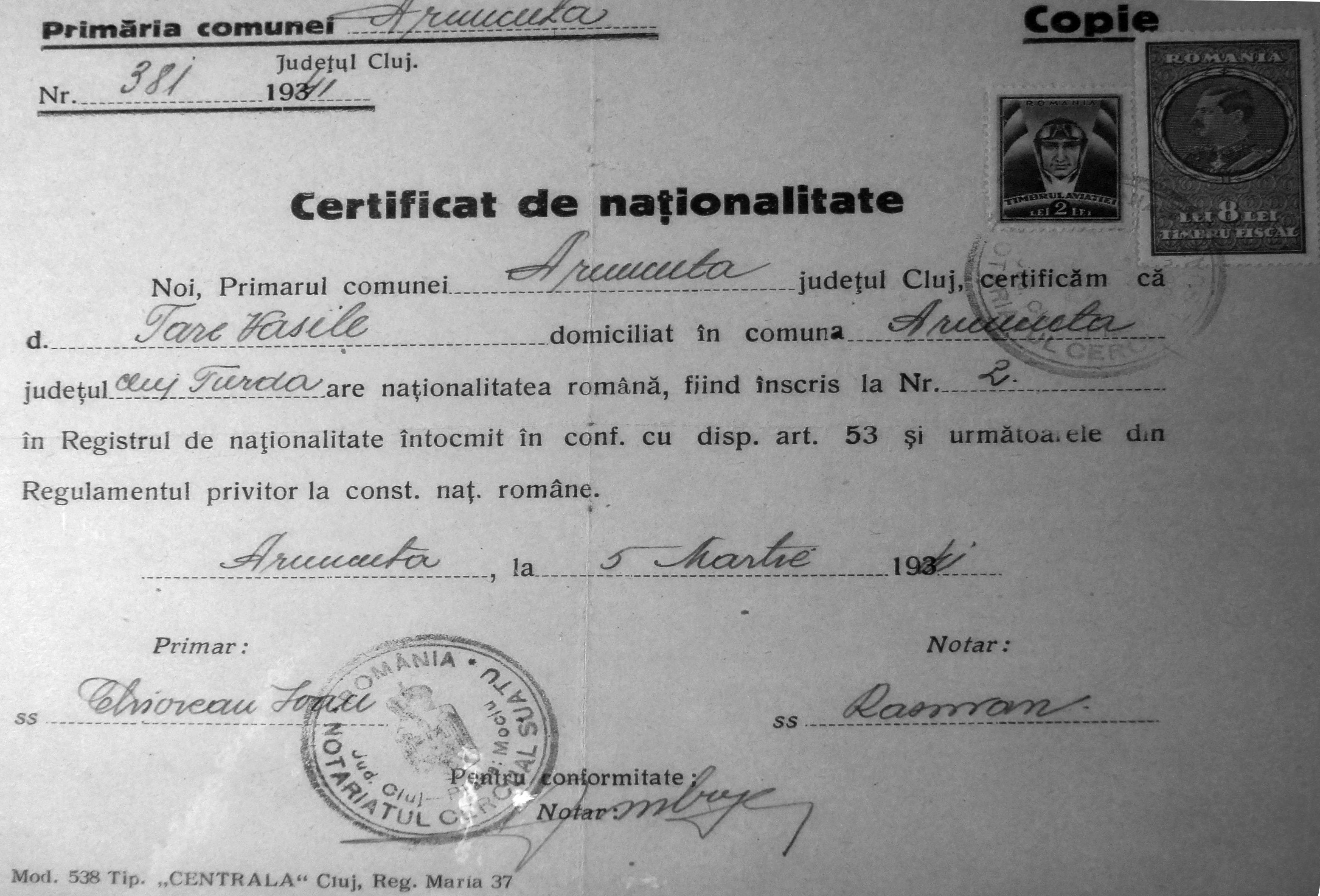 Aruncuta - Certificat de naționalitate eliberat in 1941